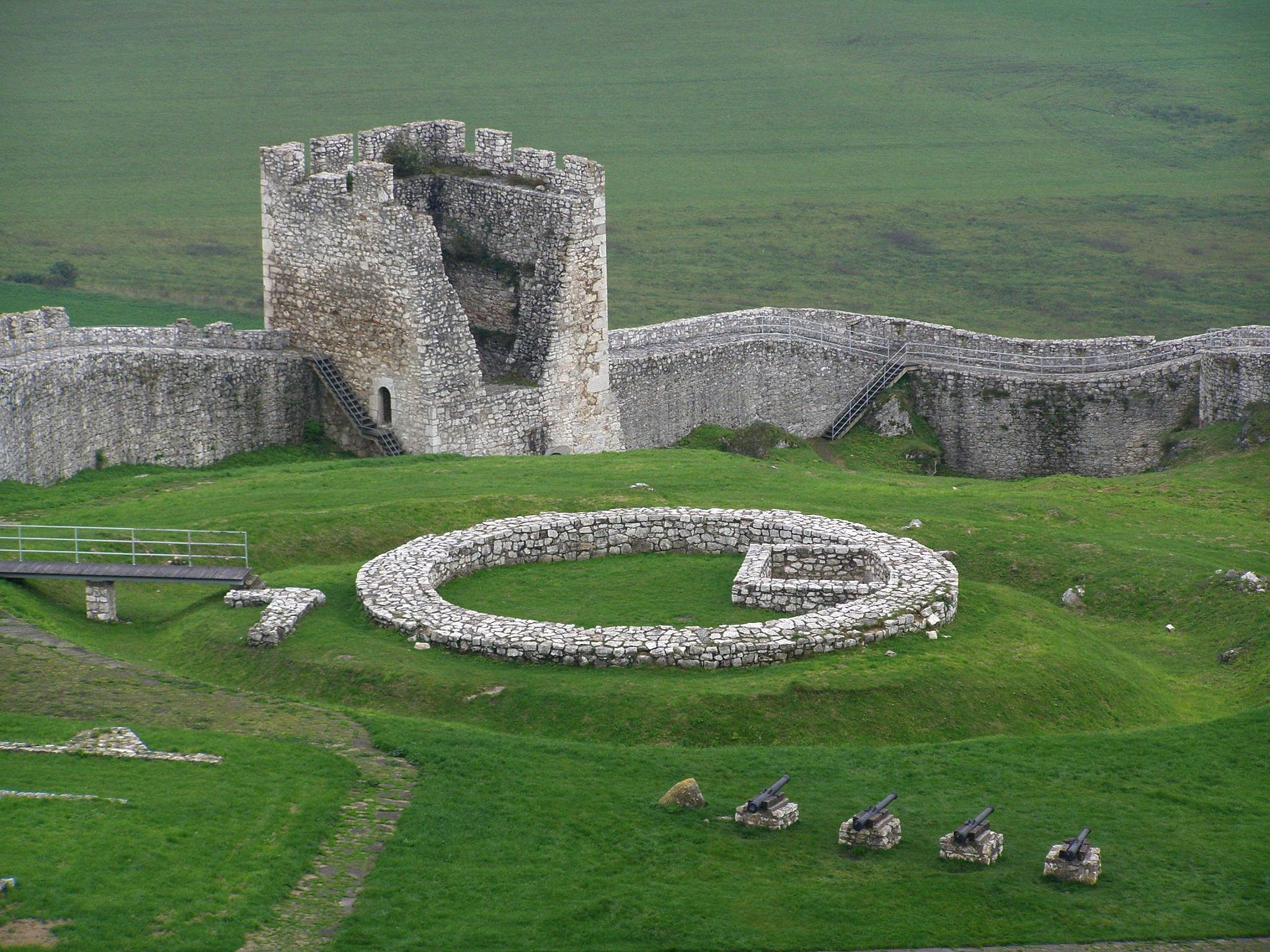 Západné hradby dolného nádvoria. Pred nimi základy tzv. Jiskrovej pevnôstky z prvej polovice 15. storočia. Okolo pevnôstky sú v teréne veľmi zreteľné pozostatky niekdajšej vodnej priekopy, ktorou bola stavba obohnaná